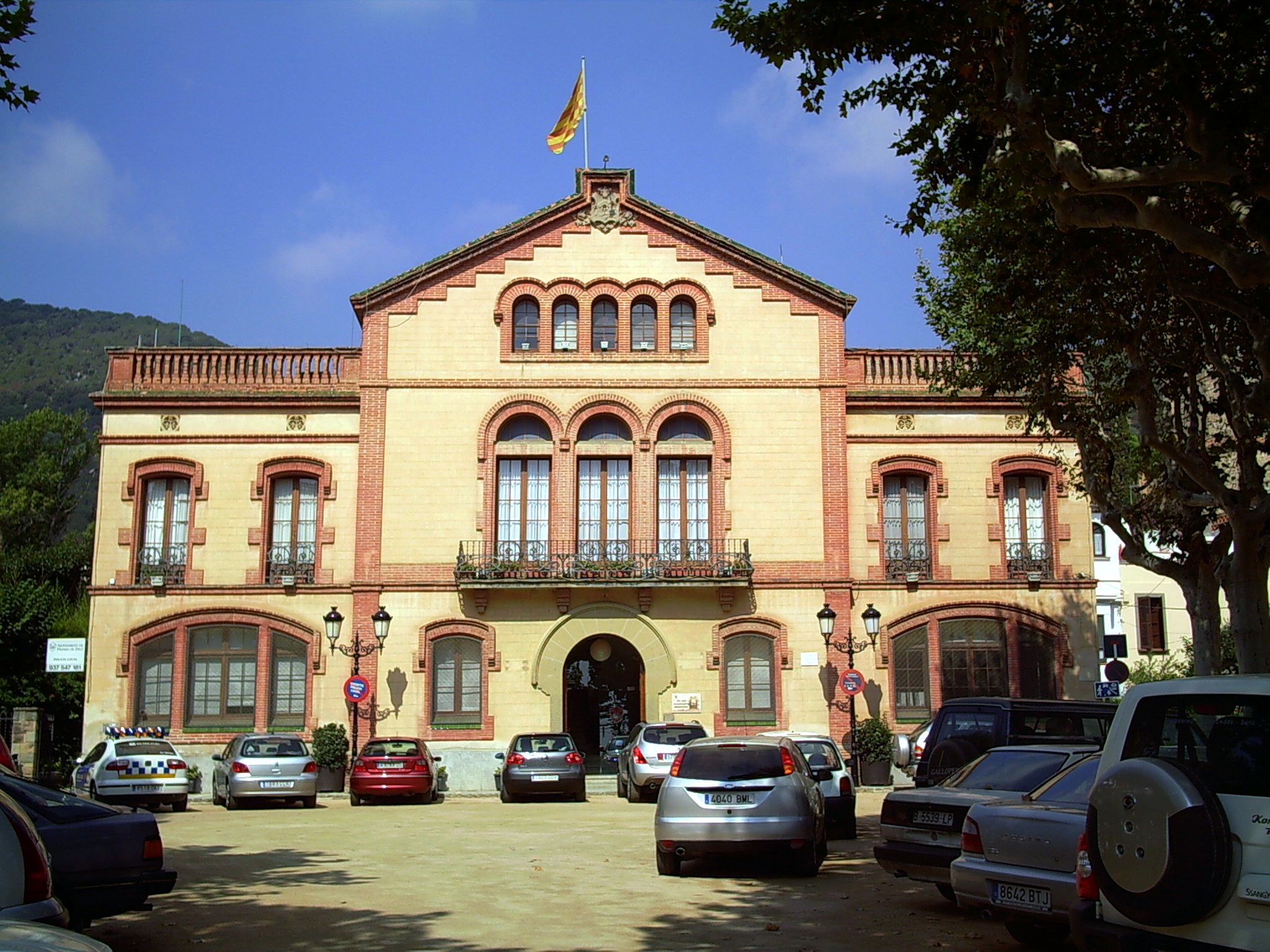 Ajuntament de Premià de Dalt, projectat per Bonaventura Bassegoda i Amigó el 1914